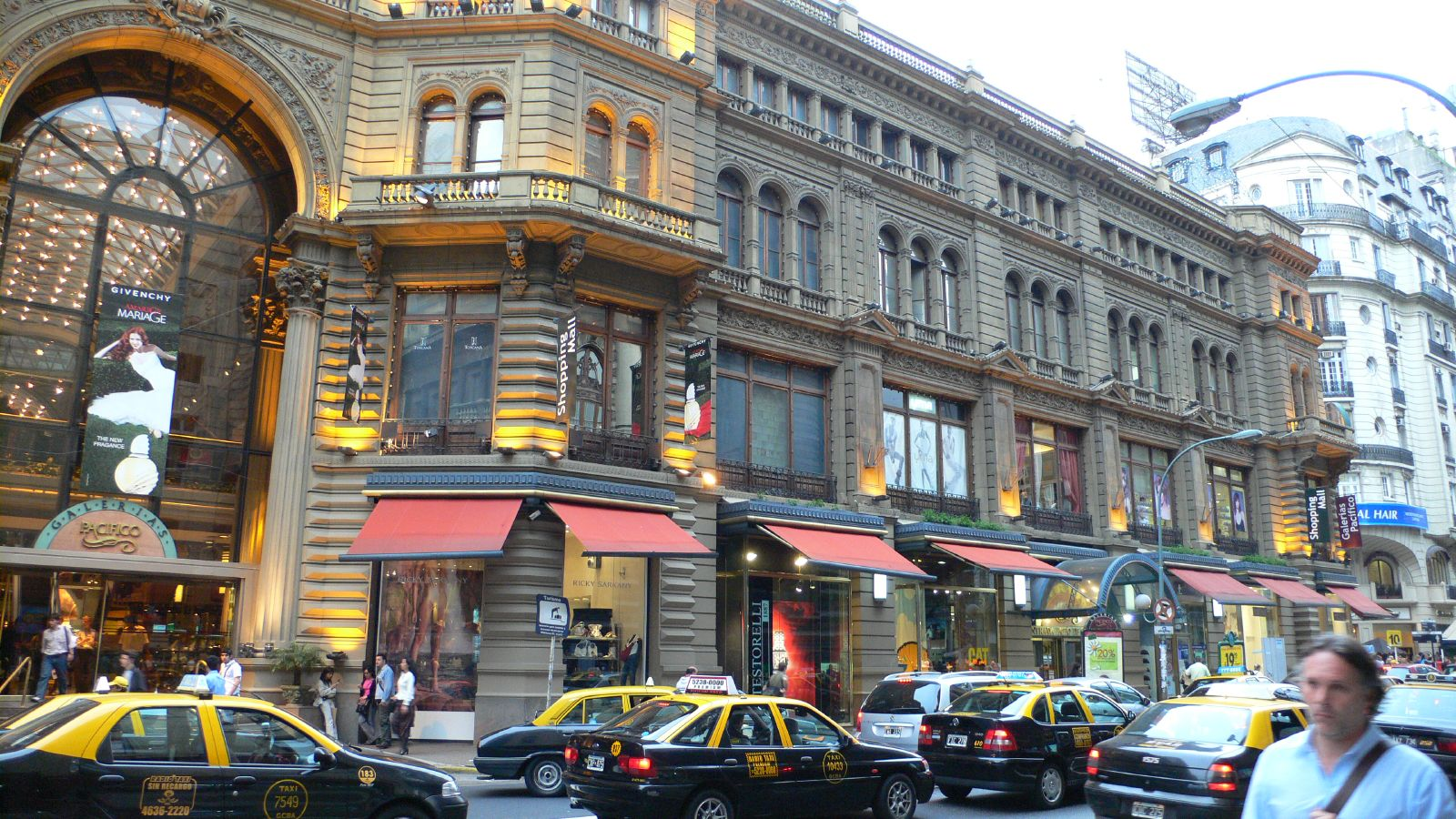 Galerías Pacífico - Buenos Aires.